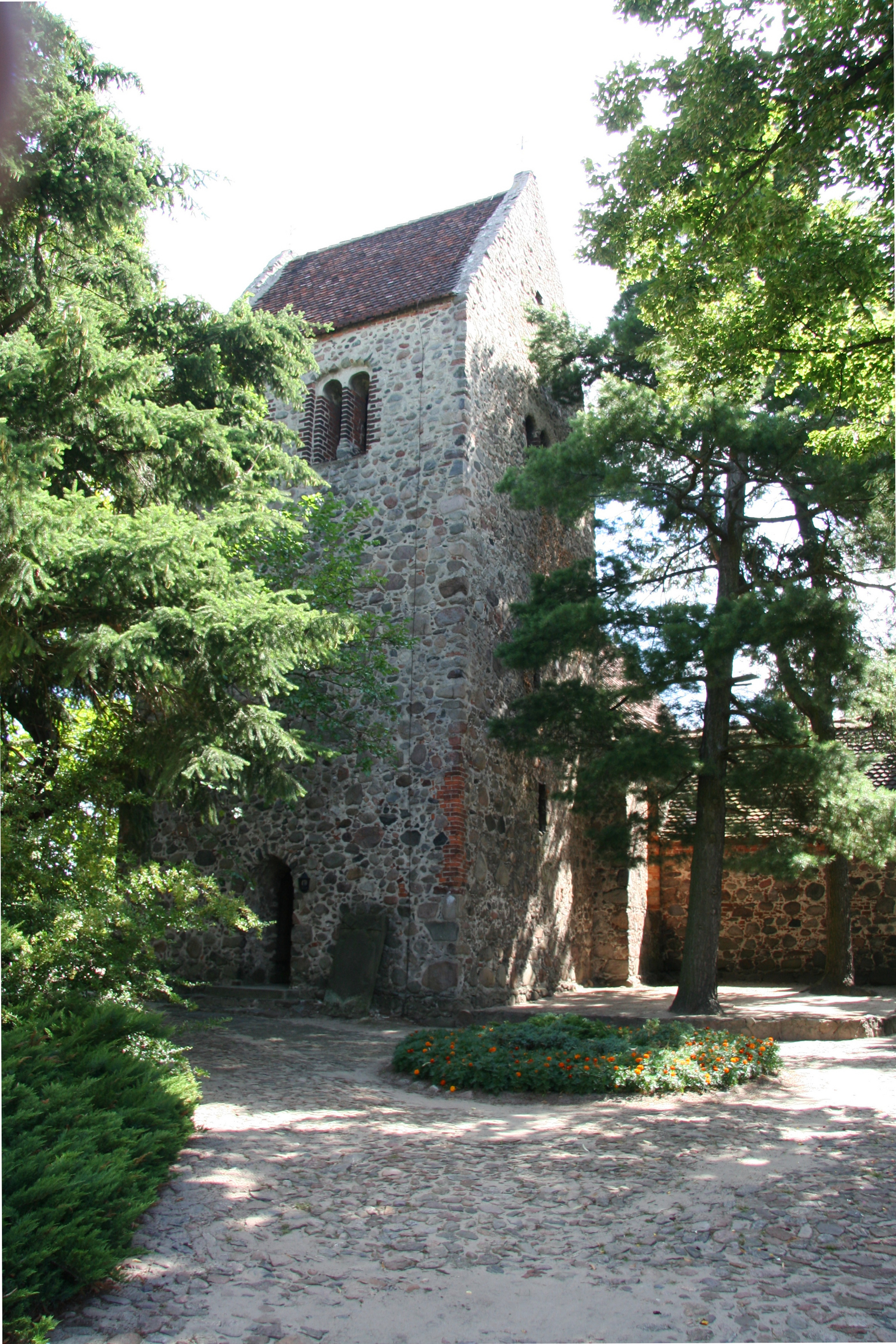 Dorfkirche in Zaue, Gemeinde Schwielochsee, Brandenburg